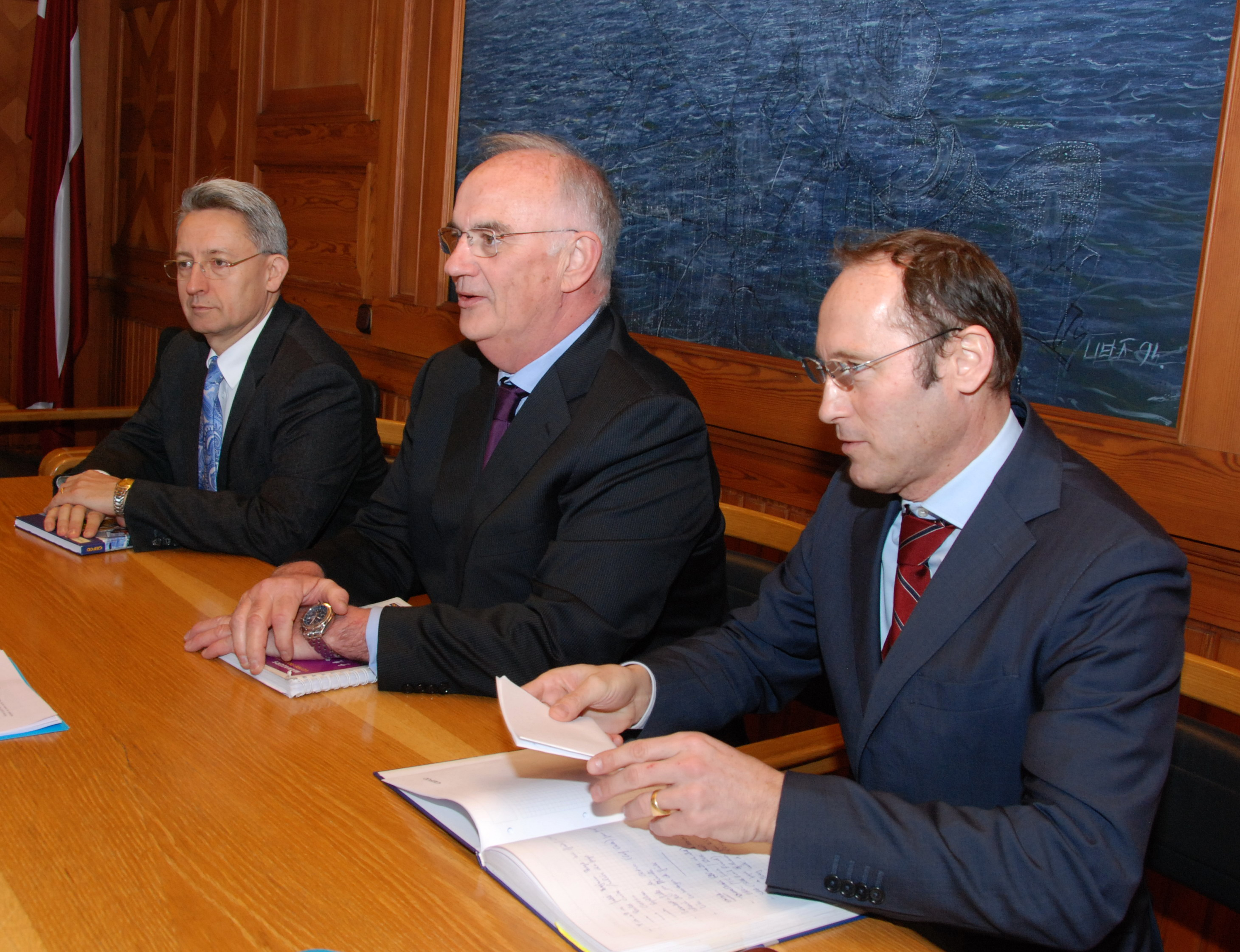 GEFCO direktors Centrālajās un Austrumeiropas un Centrālās Āzijas valstš Kristians Zbiluts (Christian Zbylut) (no kreisās), GEFCO prezidents Īvs Faržē (Yves Fargues) un GEFCO Baltic direktors Viljams le Klērs Foto: Aivis Freidenfelds, Valsts kanceleja